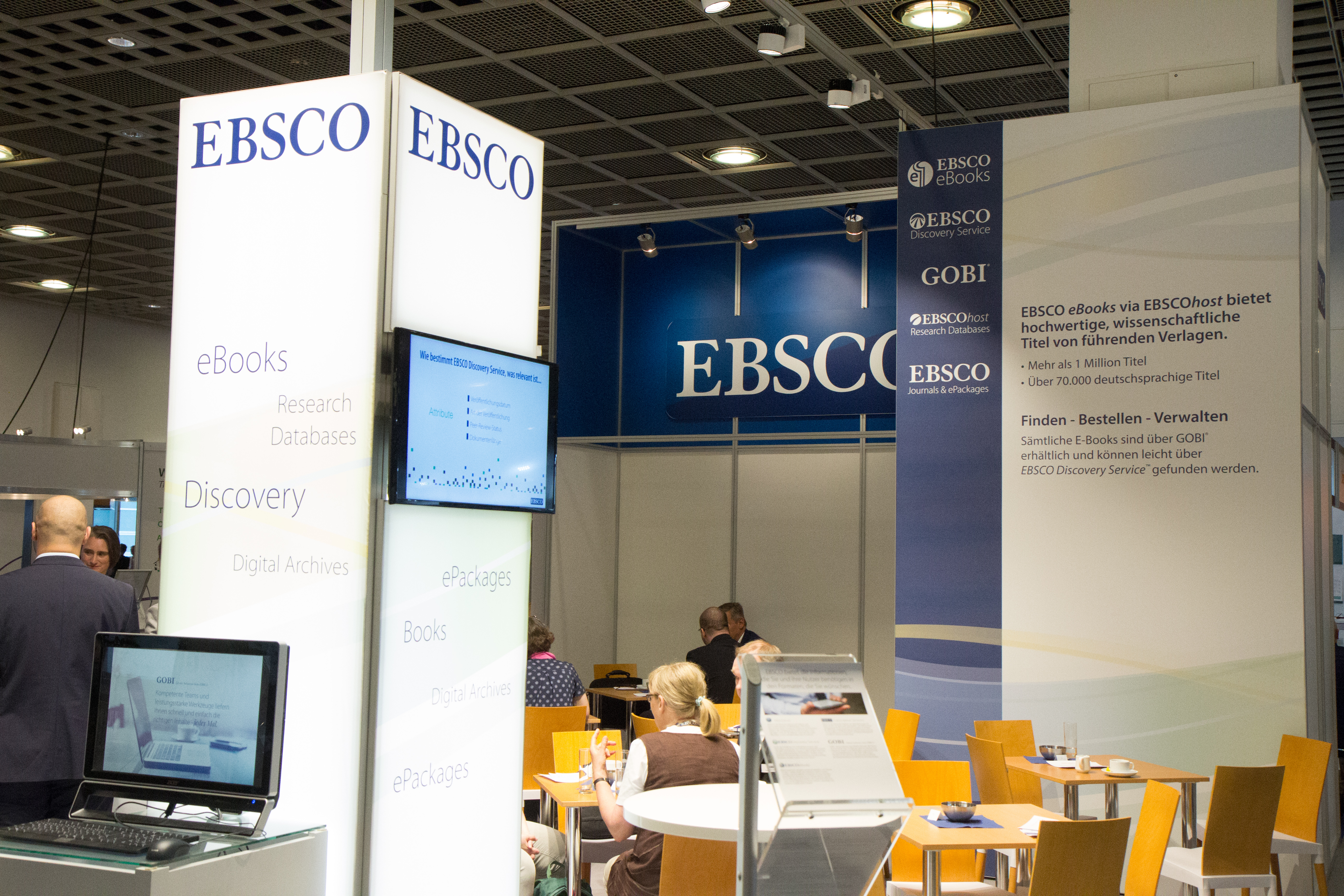 106. Deutscher Bibliothekartag in Frankfurt/Main